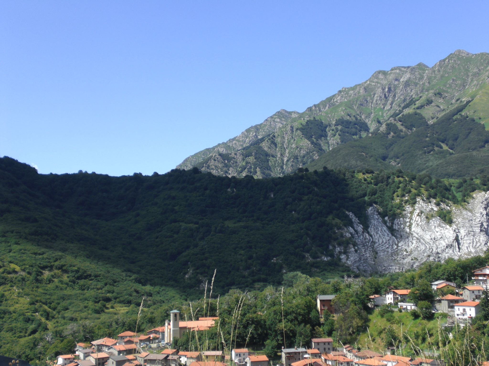 Panoramica del borgo di Sassalbo da Ca' Giannino.